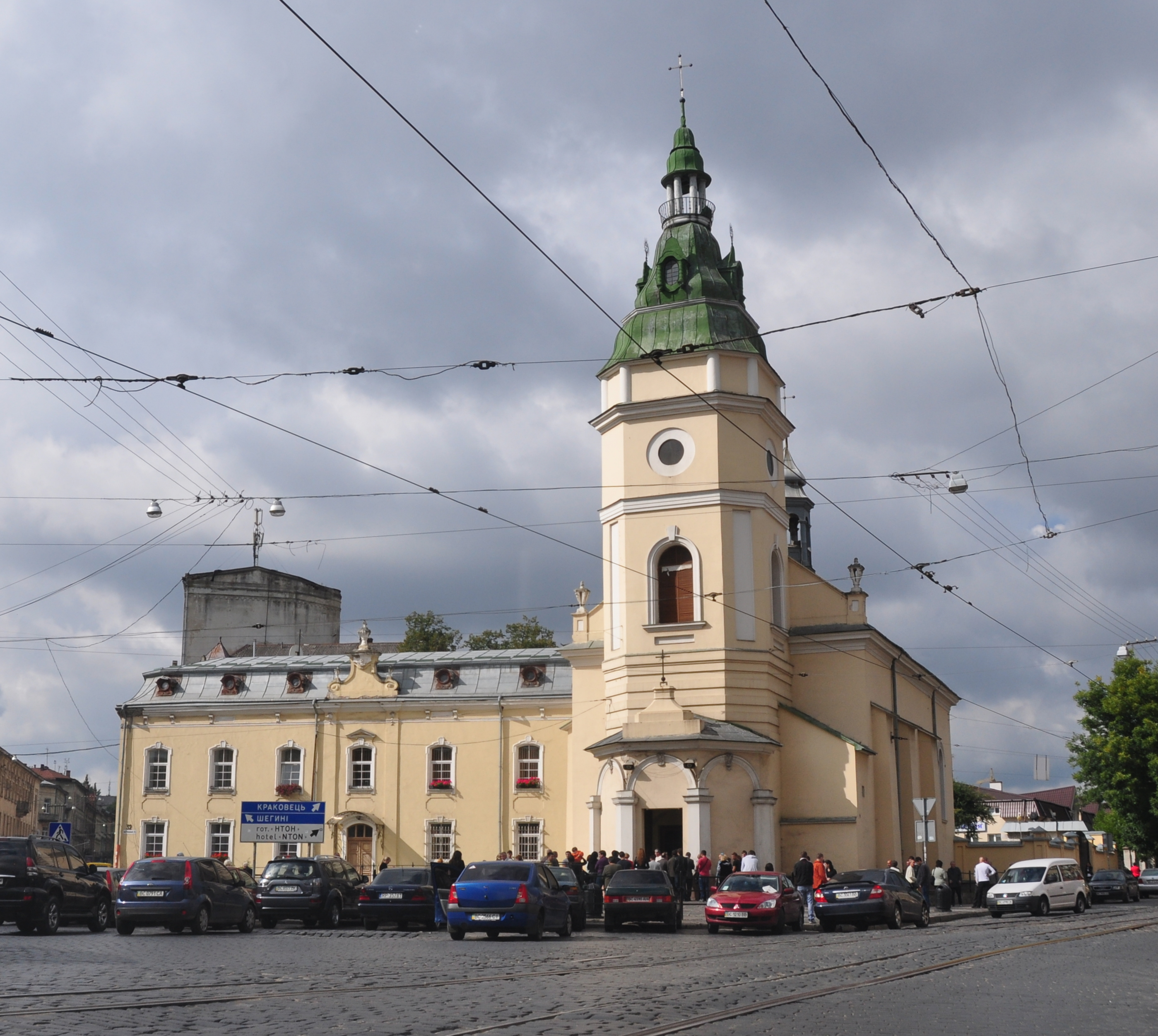 Церква св.Анни, вул.Городоцька 32 під час недільної Служби Божої.